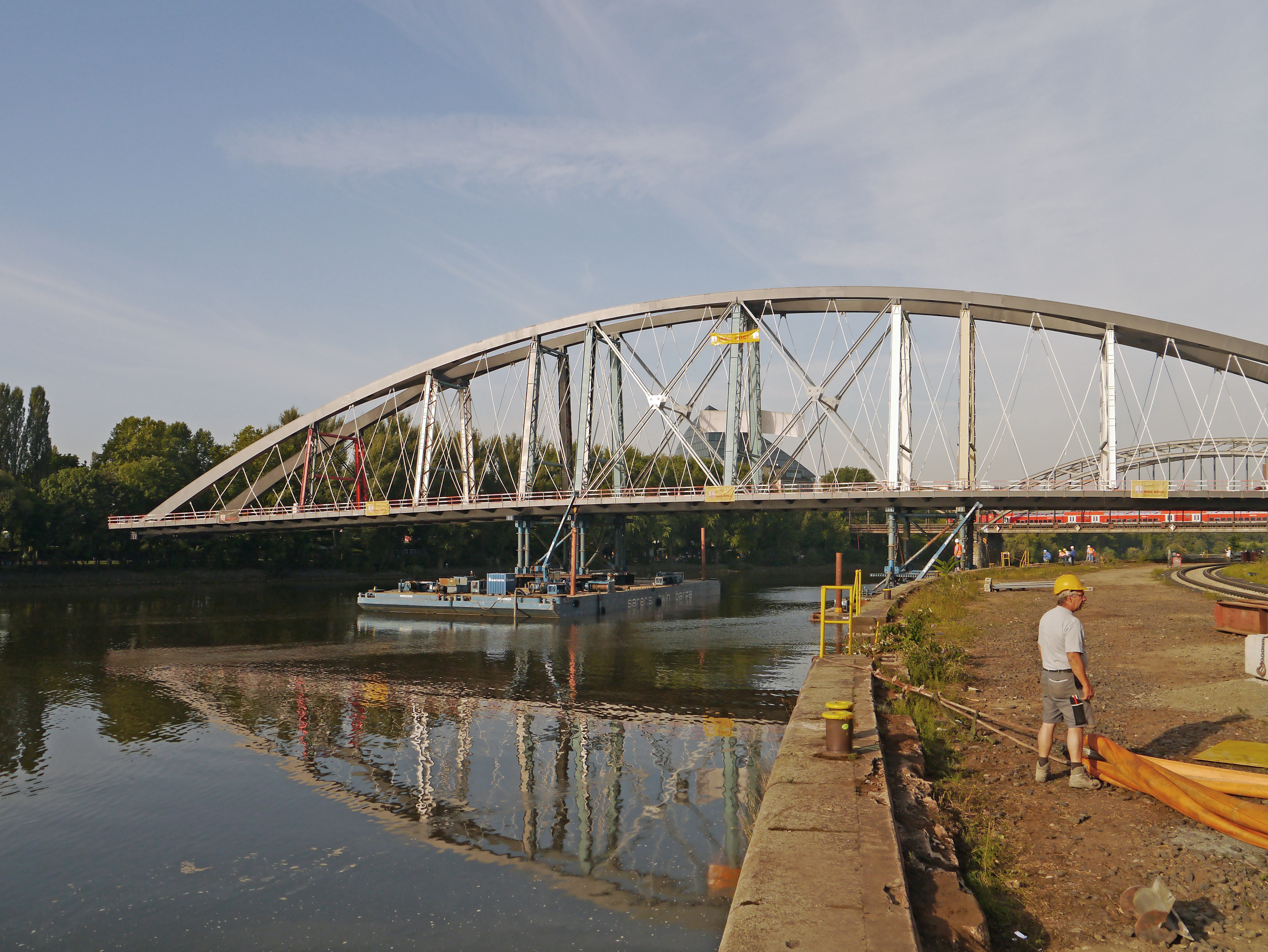 Die Osthafenbruecke waehrend des Einschwimmens, am 23. August 2012, um 7 Uhr 43. Blick vom noerdlichen Mainufer, an der Hafeneinfahrt in Frankfurt am Main.